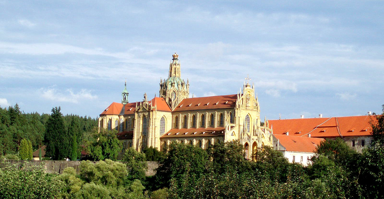 Klaster Kladruby